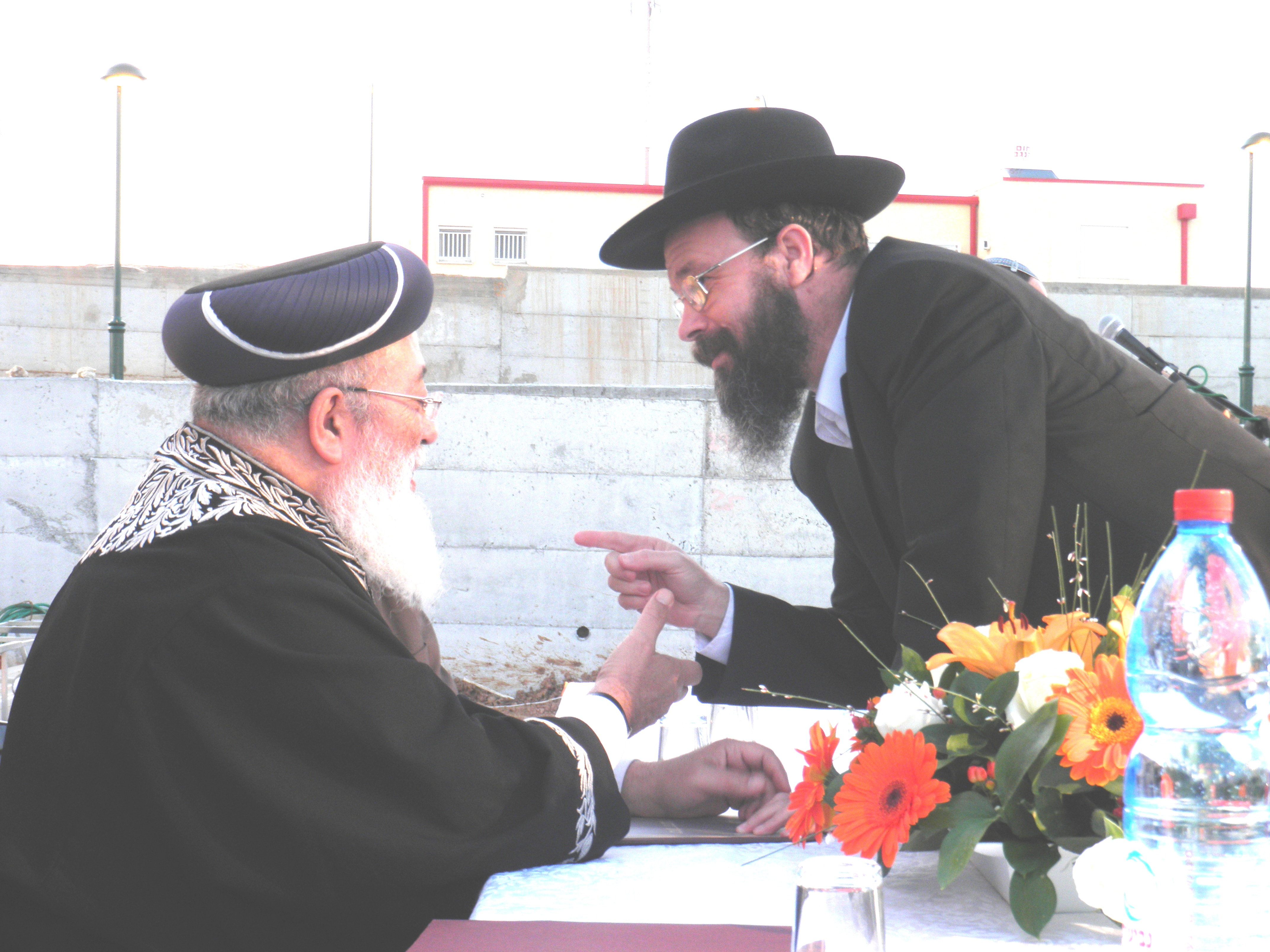 הרב שלמה עמאר והרב מיכה הלוי בטקס העלייה לקרקע בשבי דרום